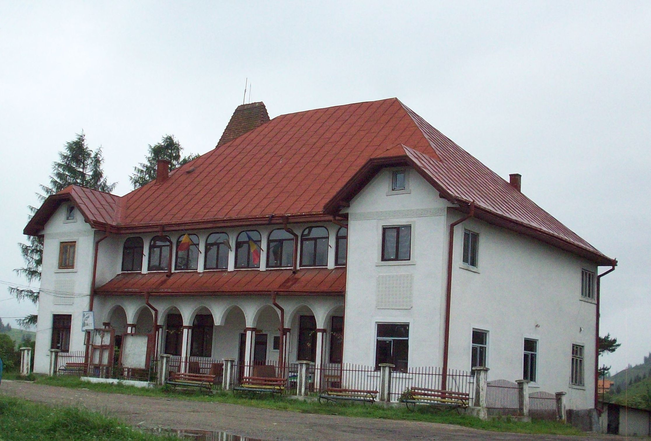 Fotografie facută la data de 17.06.2010 de mine cu un aparat Kodak Easzshare M753 Yoom Digital. În fotografie se vede Căminul Cultural Dorna Arini.